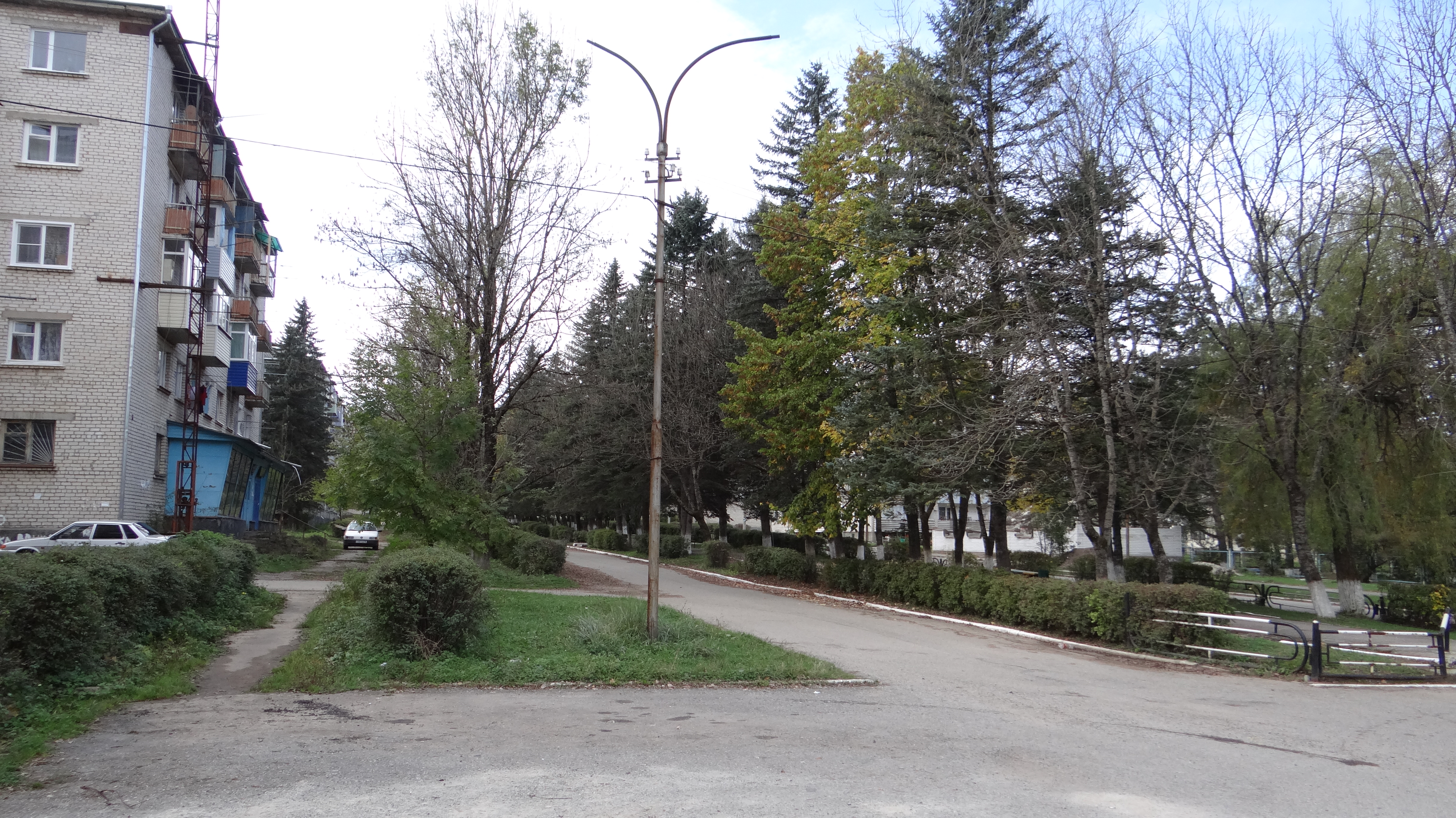 Mednogorskiy, Karachaevo-Cherkesskaya Republits, Russia, 369281